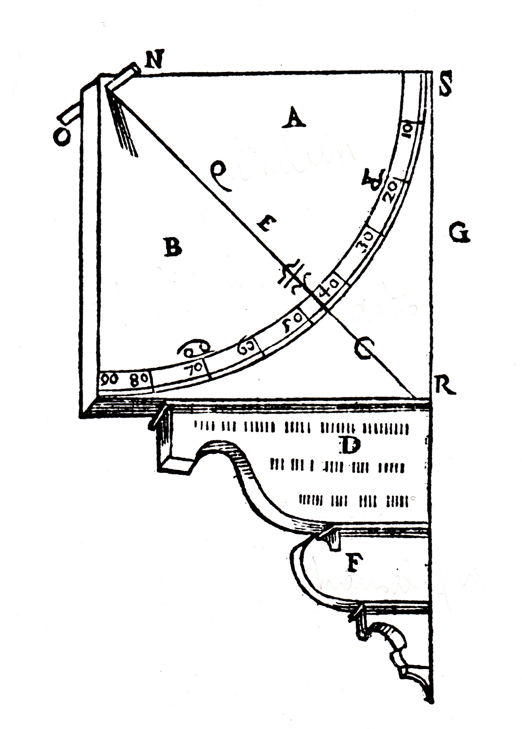 Quadrant de Danti, tel Ptolémée.